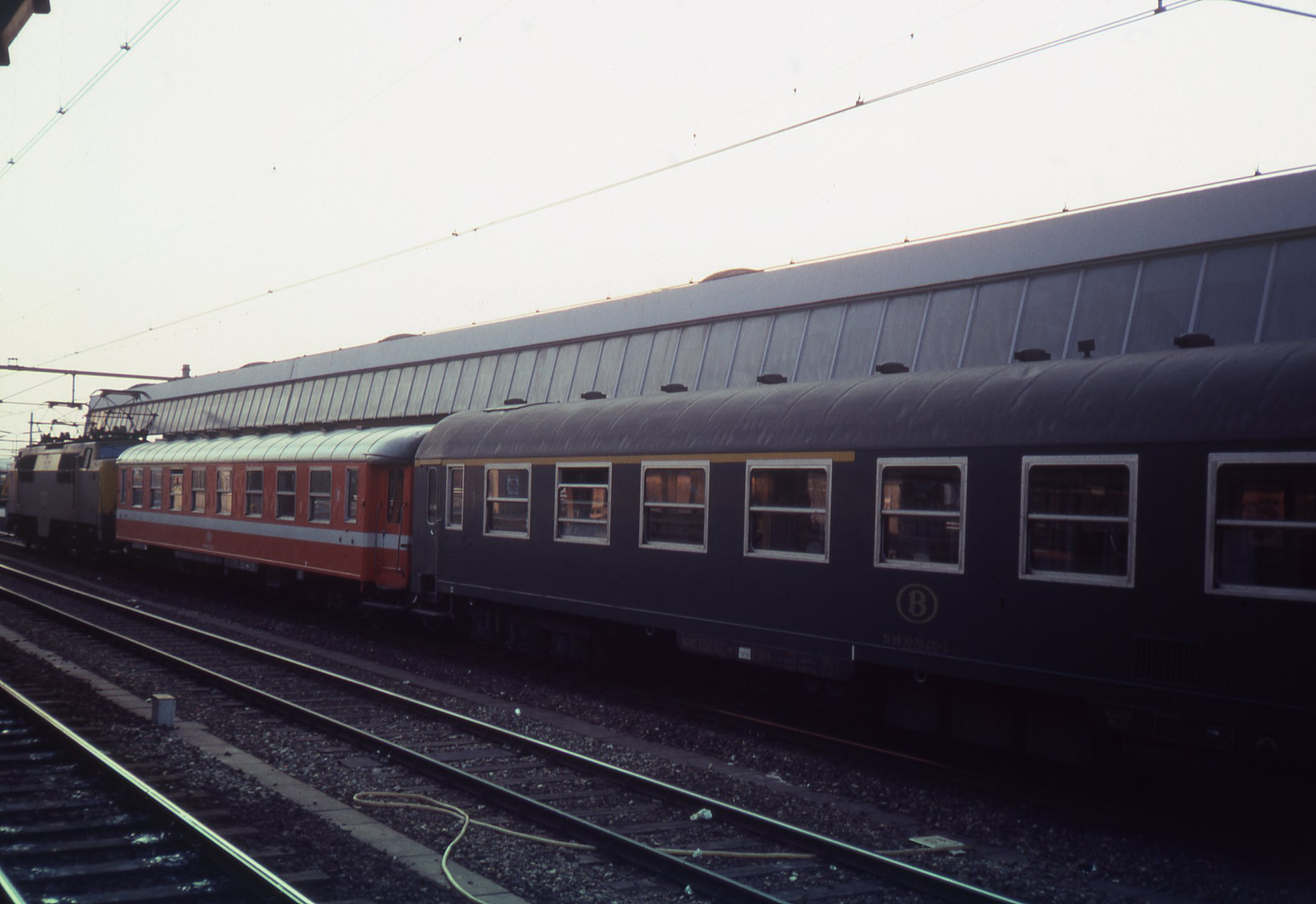 Een internationale trein in Rotterdam CS